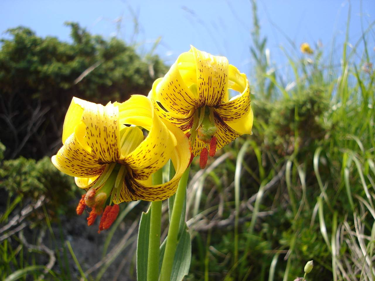 Vitosha mountain, Bulgaria (Lilium jankae)